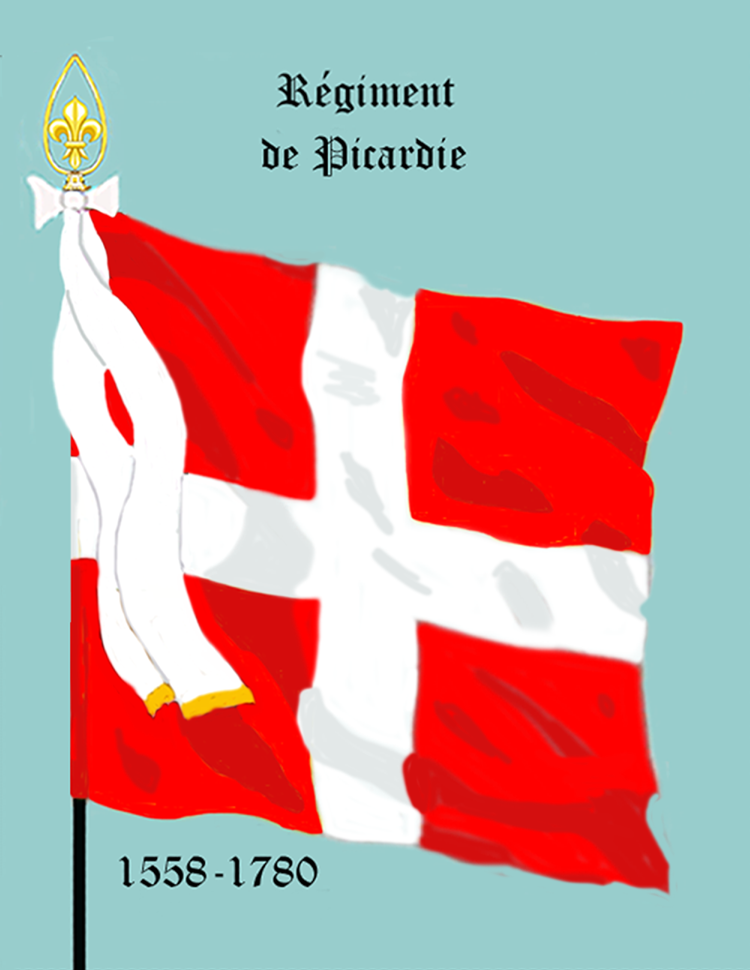 Ordonnanzfahne eines königlich französischen Infanterie-Regiments. - Entnommen und überarbeitet aus: „LES UNIFORMES ET LES DRAPEAUX DE L'ARMÉE DU ROI“ Marseille 1899. (Drapeau d'Ordonnance d' un régiment française d'infanterie royale.)